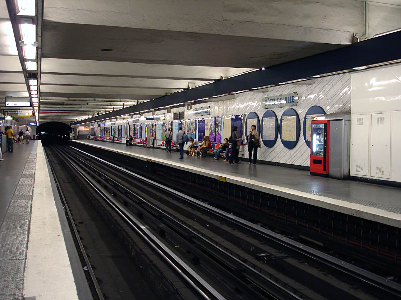 Station Hôtel de Ville, de la ligne 1 du métro de Paris, France.